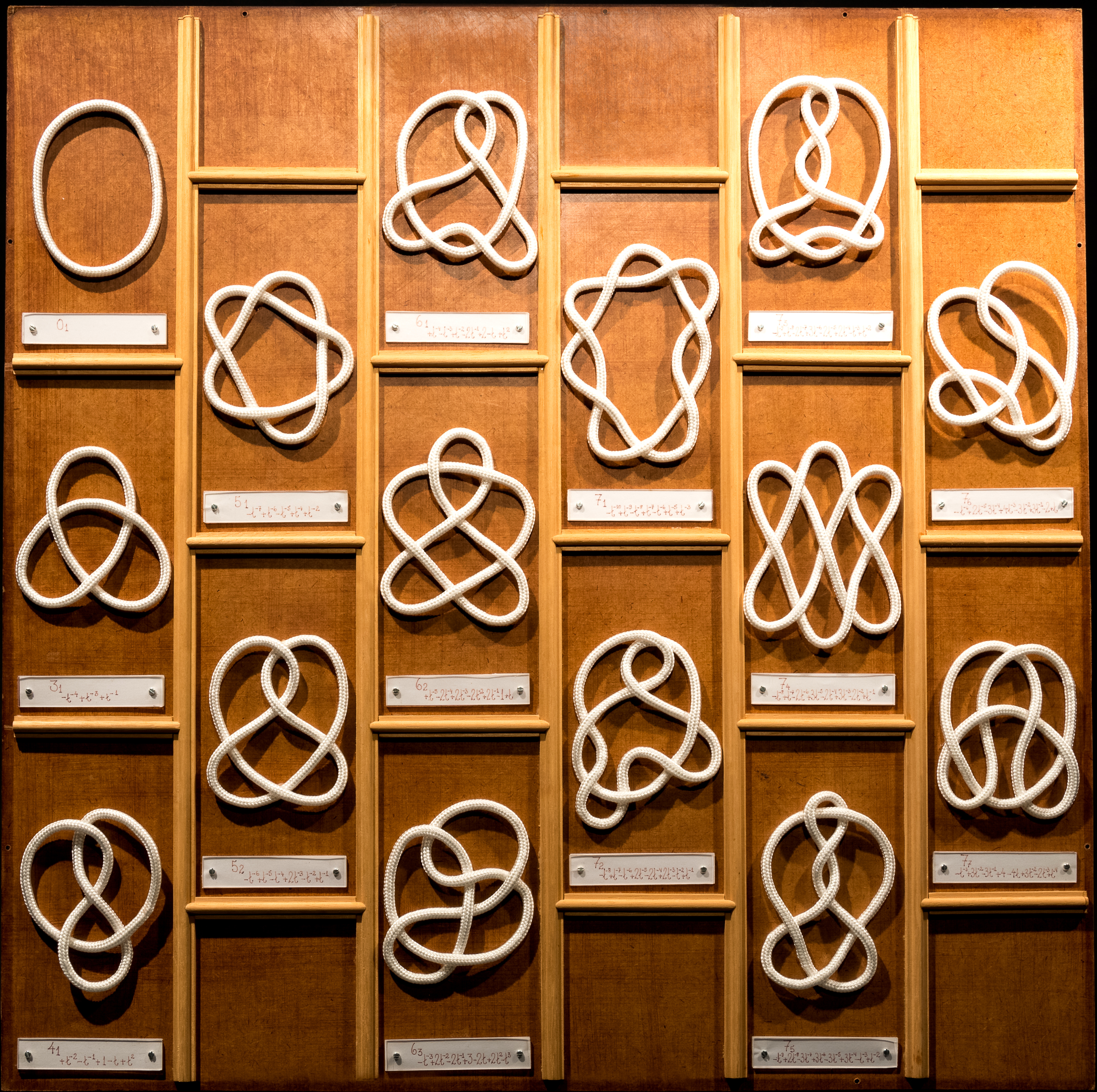 Tabela de nós matemáticos